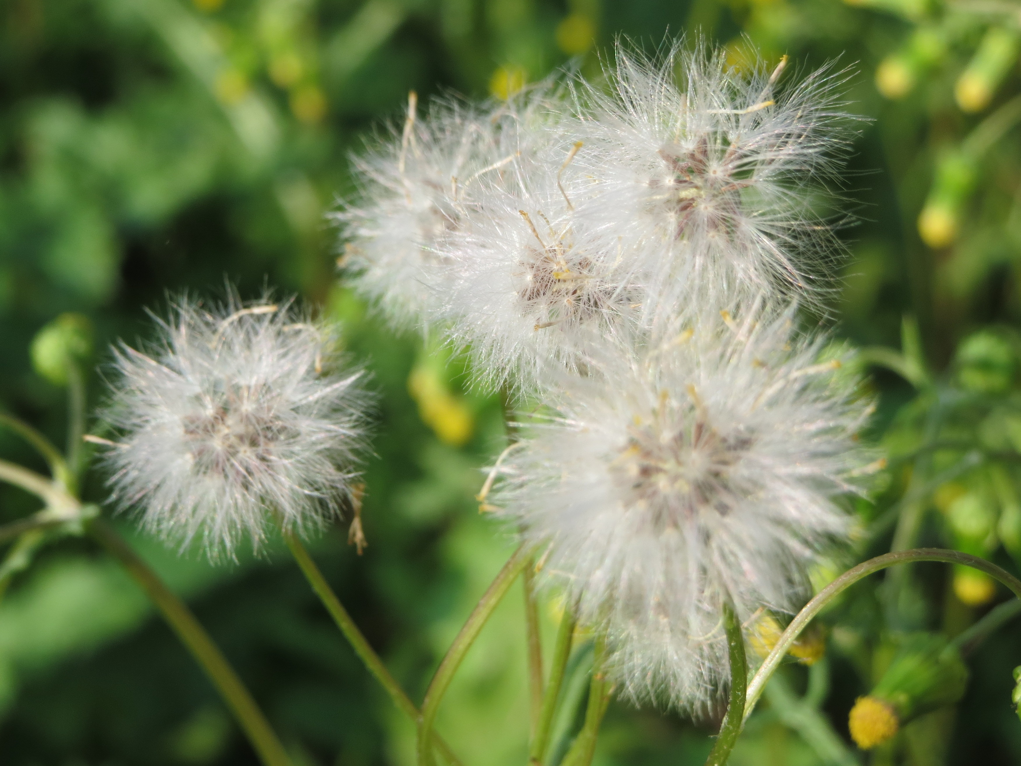 Gewöhnliches Greiskraut (Senecio vulgaris) in Hockenheim